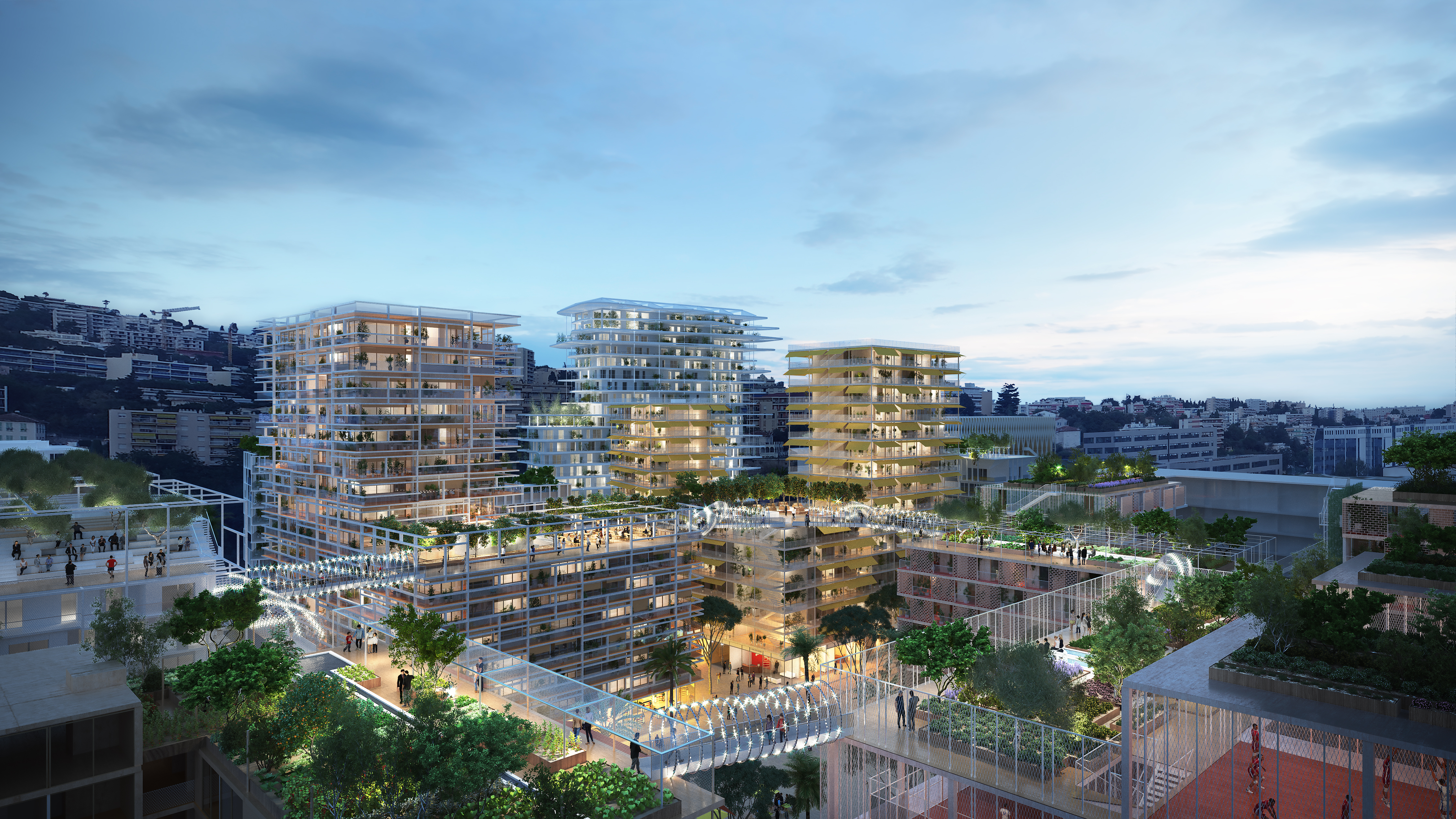 L'archipel architectural Joia Méridia, dans la Vallée du Var à Nice.